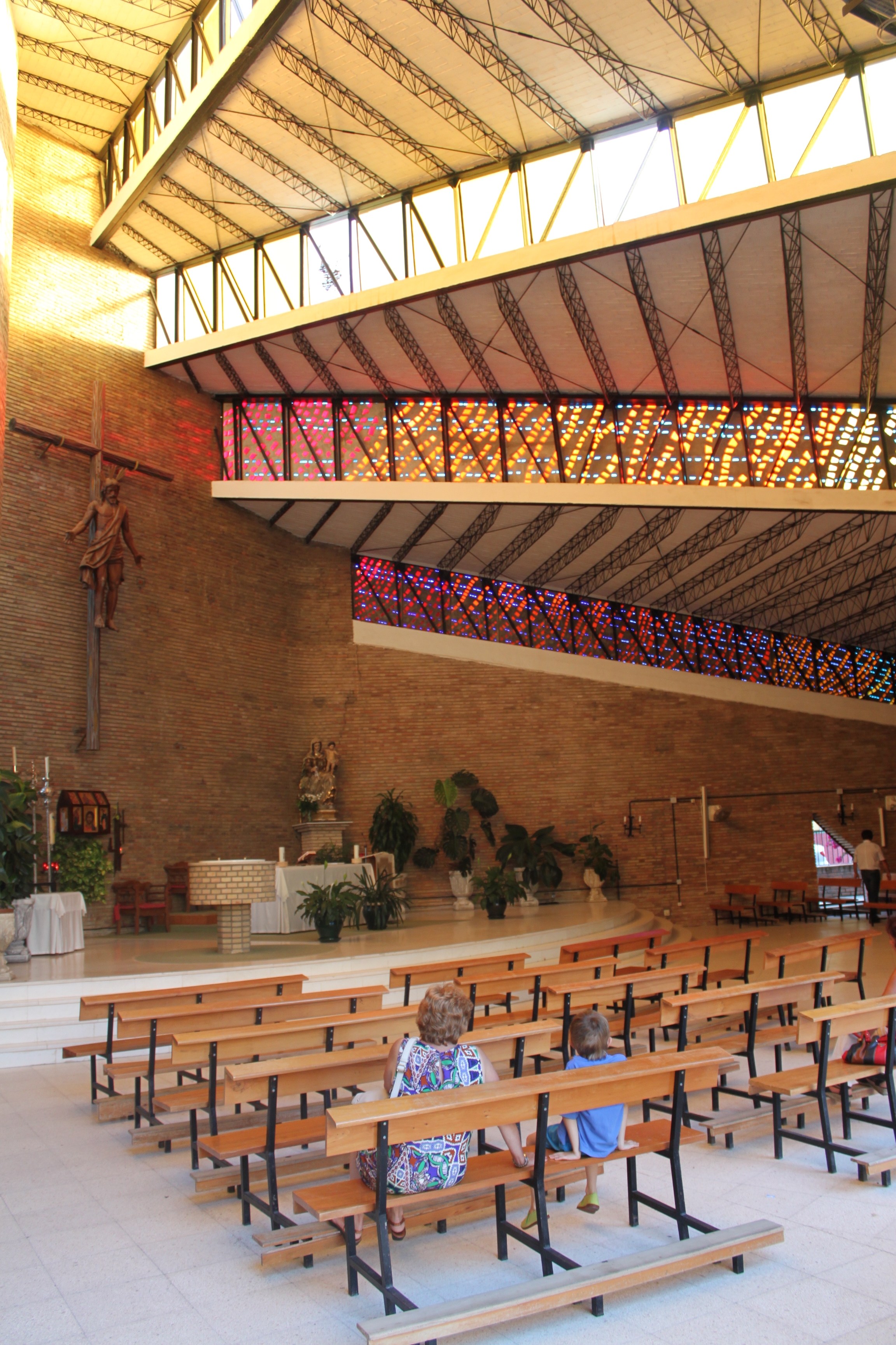 Altar